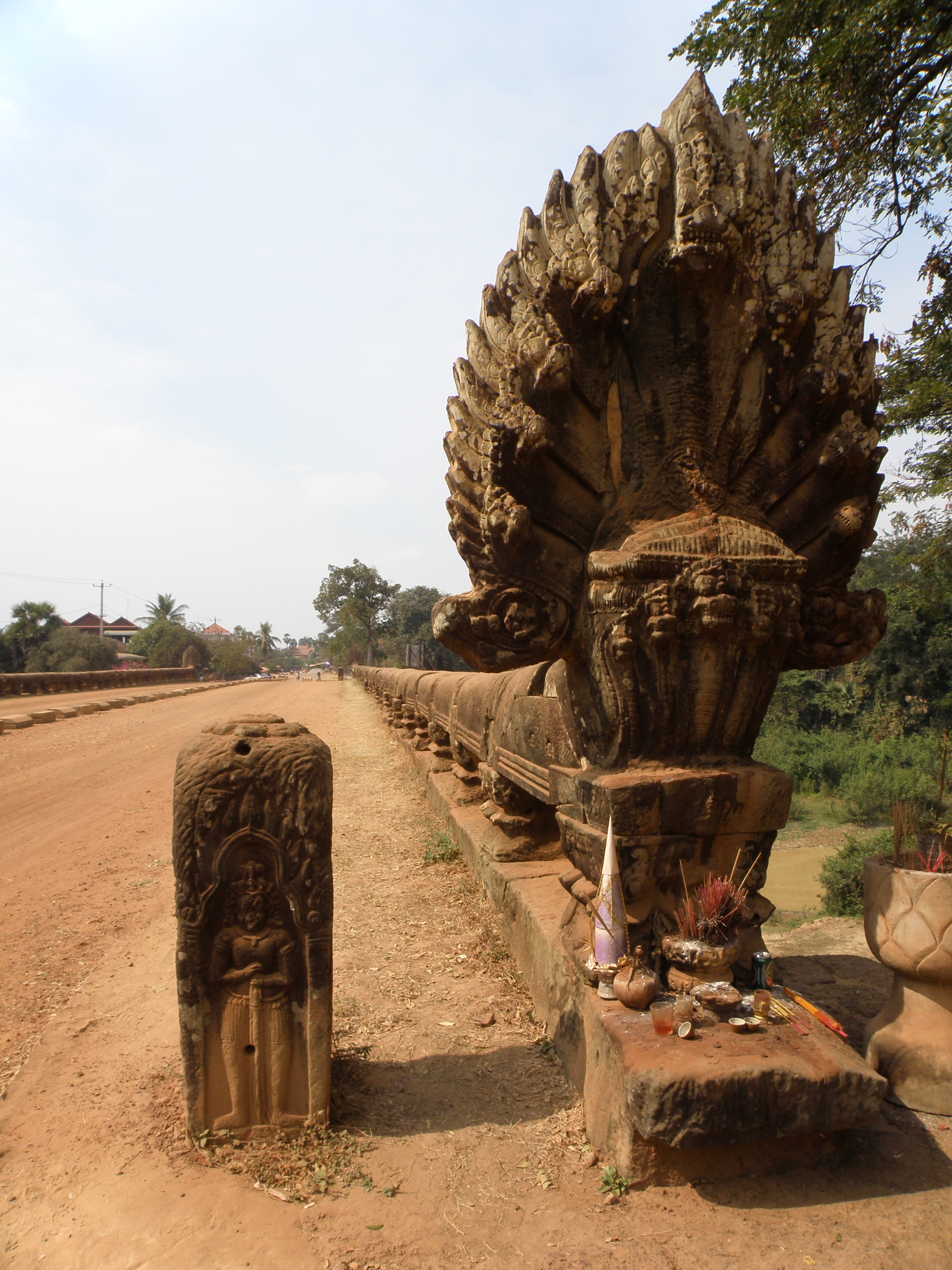 Cambodge - Offrande à l'un des 4 nâgas du pont de Kompong Kdei (12e siècle)